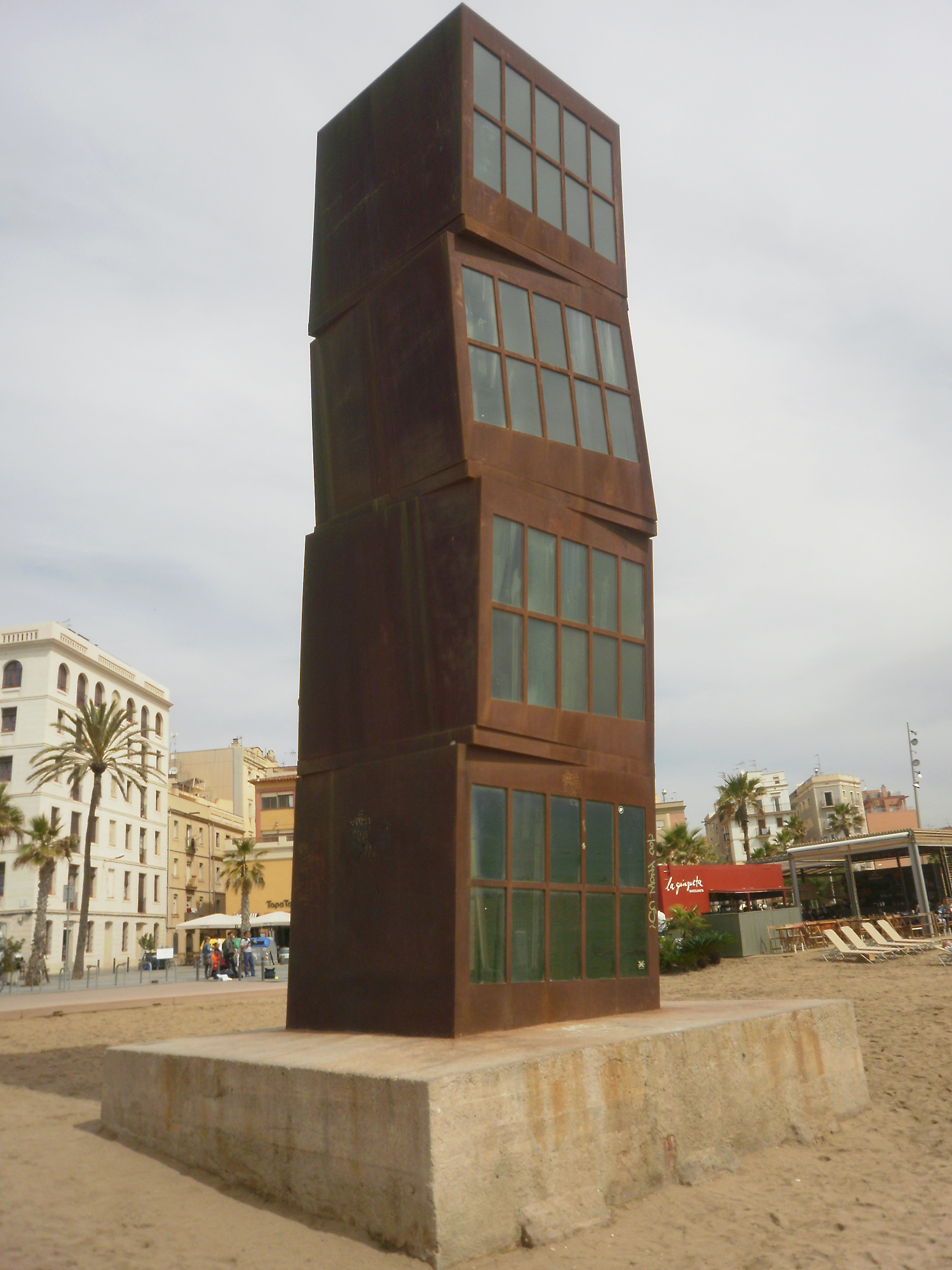 L'estel ferit